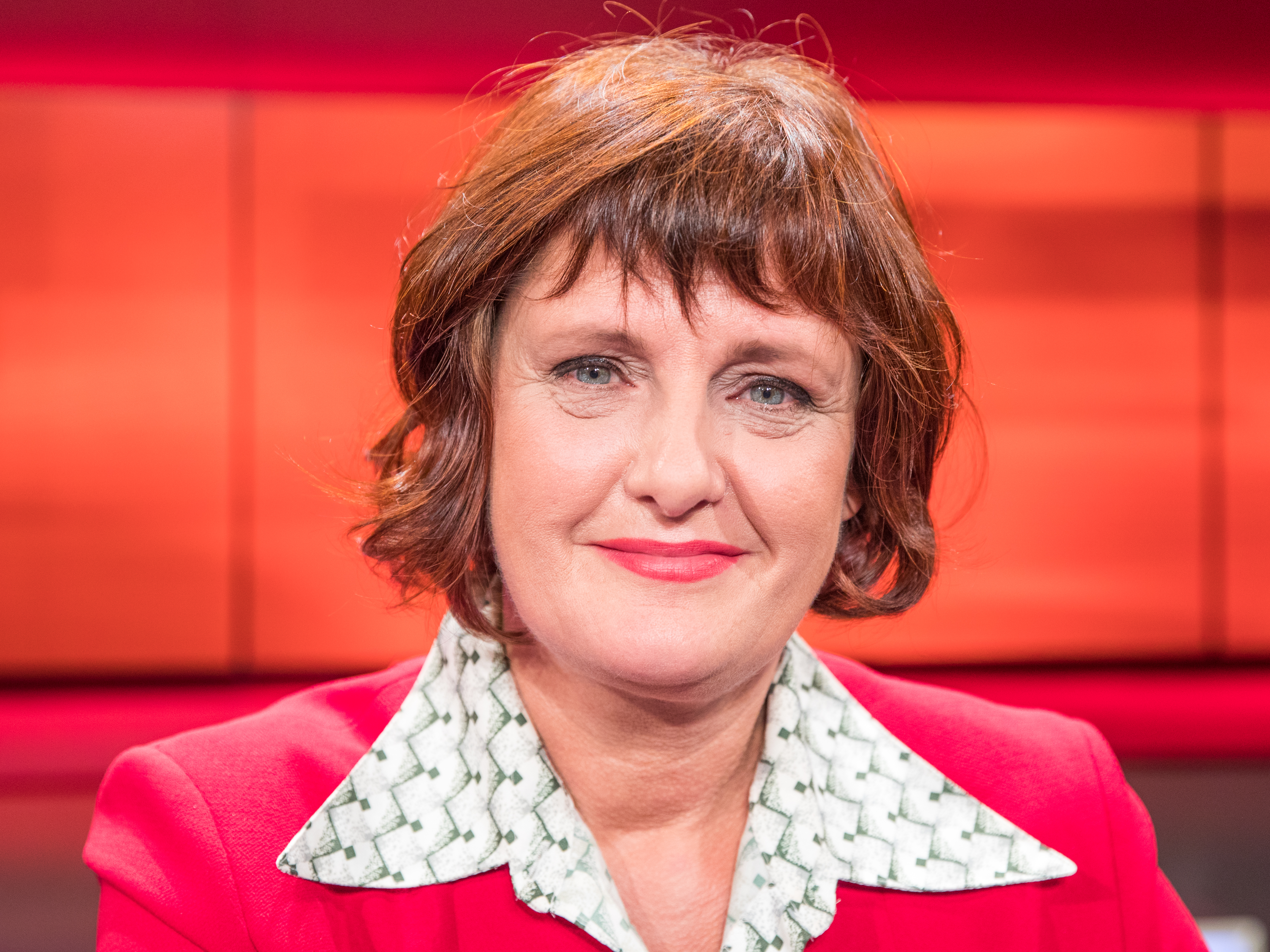 Pressetermin nach der Sendung „Hart aber Fair“ am 30. September 2019. Thema der Sendung: „Trump und Johnson unter Druck – Endspiel der Populisten?" Foto: Annette Dittert, Korrespondentin und Studioleiterin des ARD-Büros in London